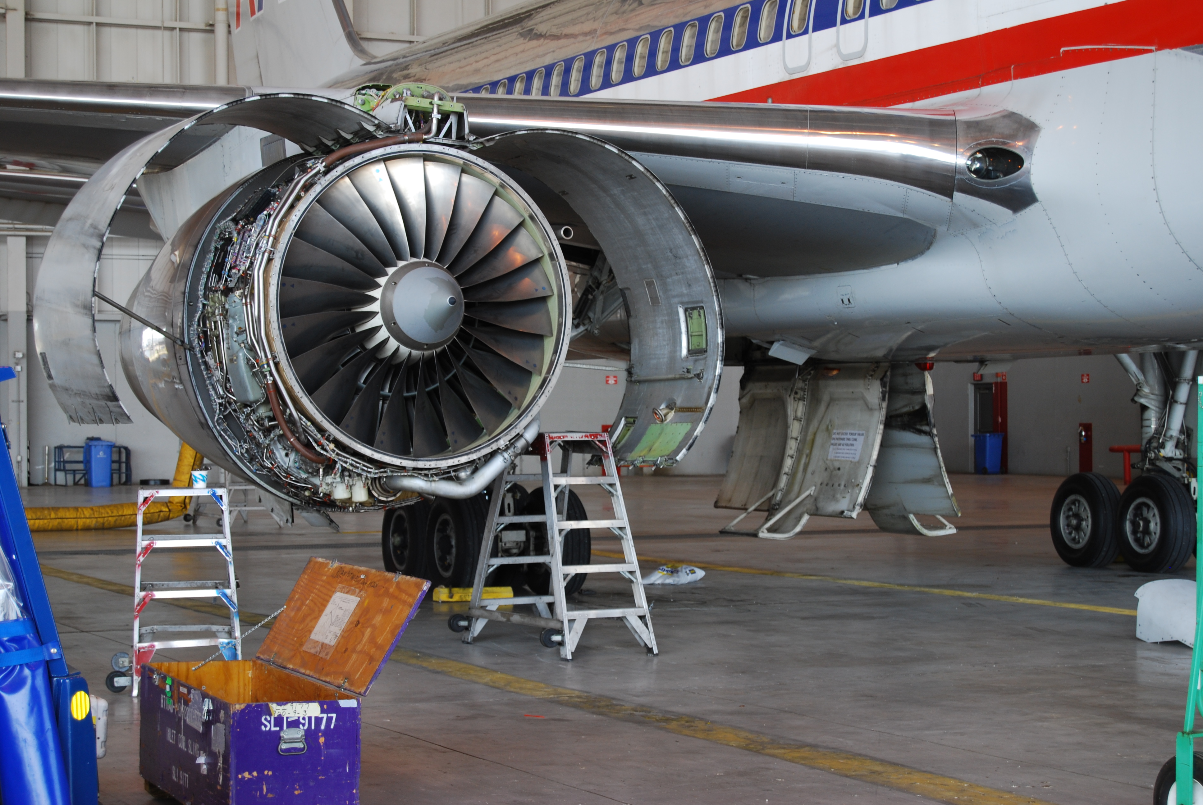 35_DSC_0927